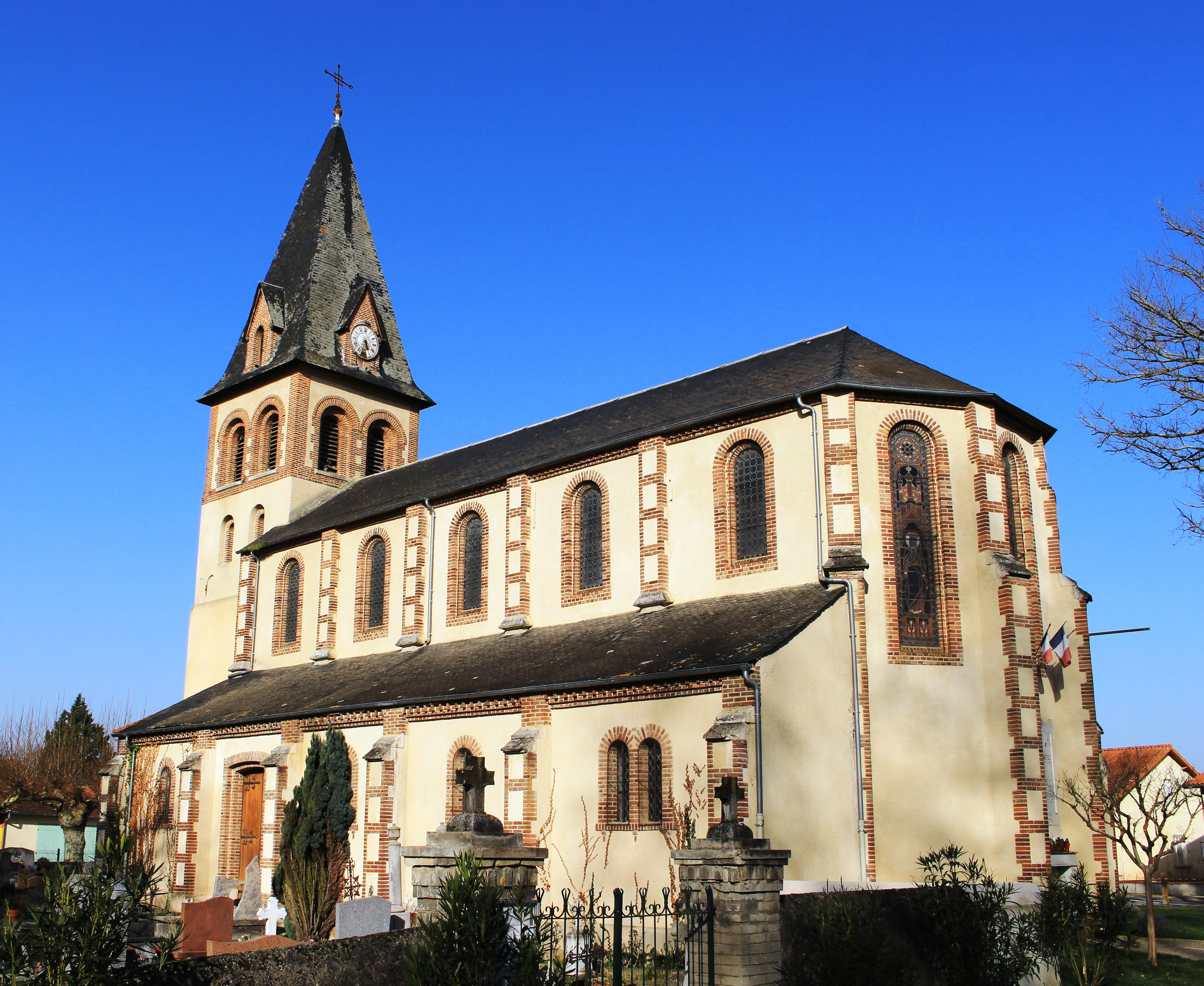 Eglise Saint-Martin de Chelle-Debat (Hautes-Pyrénées)